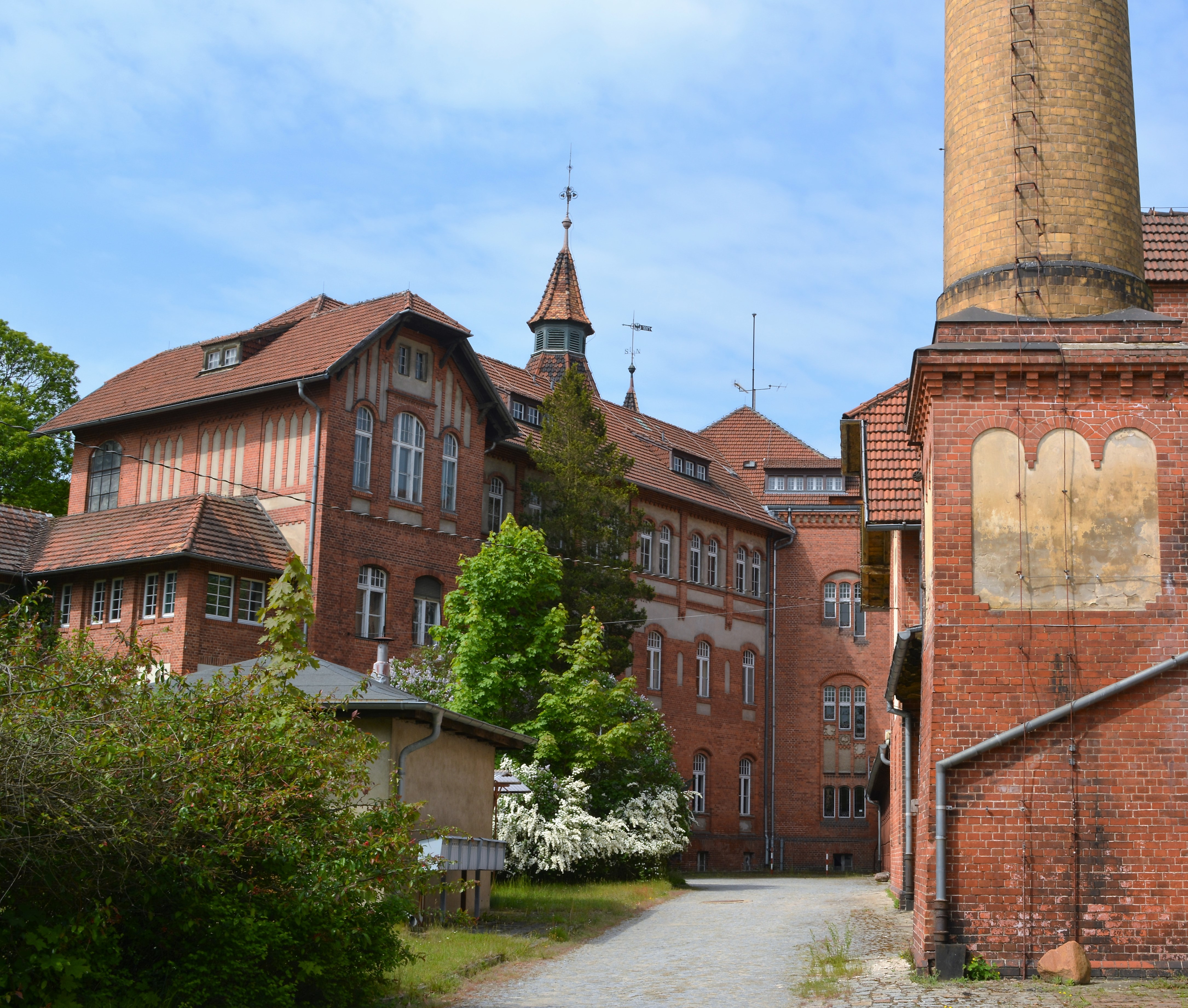 Teil der denkmalgeschützten ehemaligen Lungenheilstätte Kolkwitz, jetzt Klinikum Kolkwitz, errichtet 1900